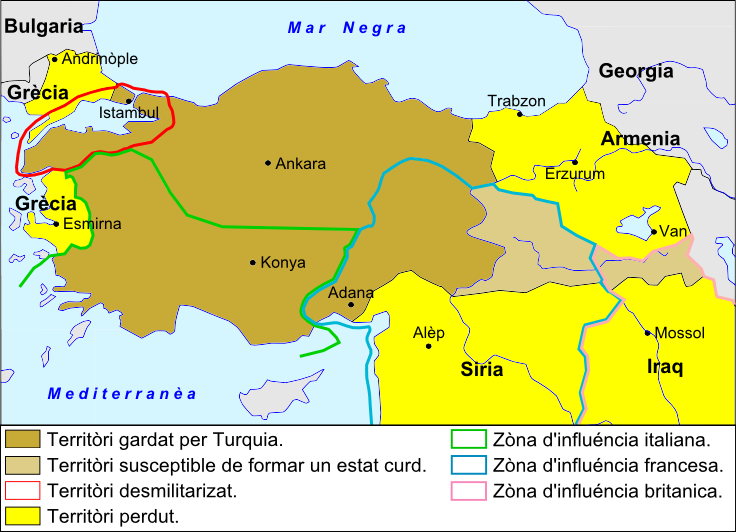 Turquia après lo Tractat de Sèvres (1920).